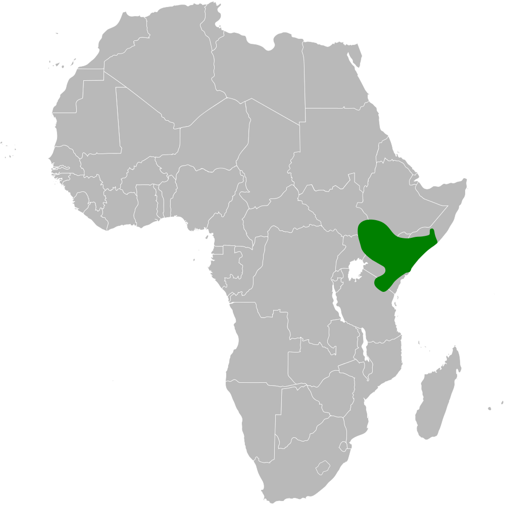 Calendulauda poecilosterna distribution map, based on